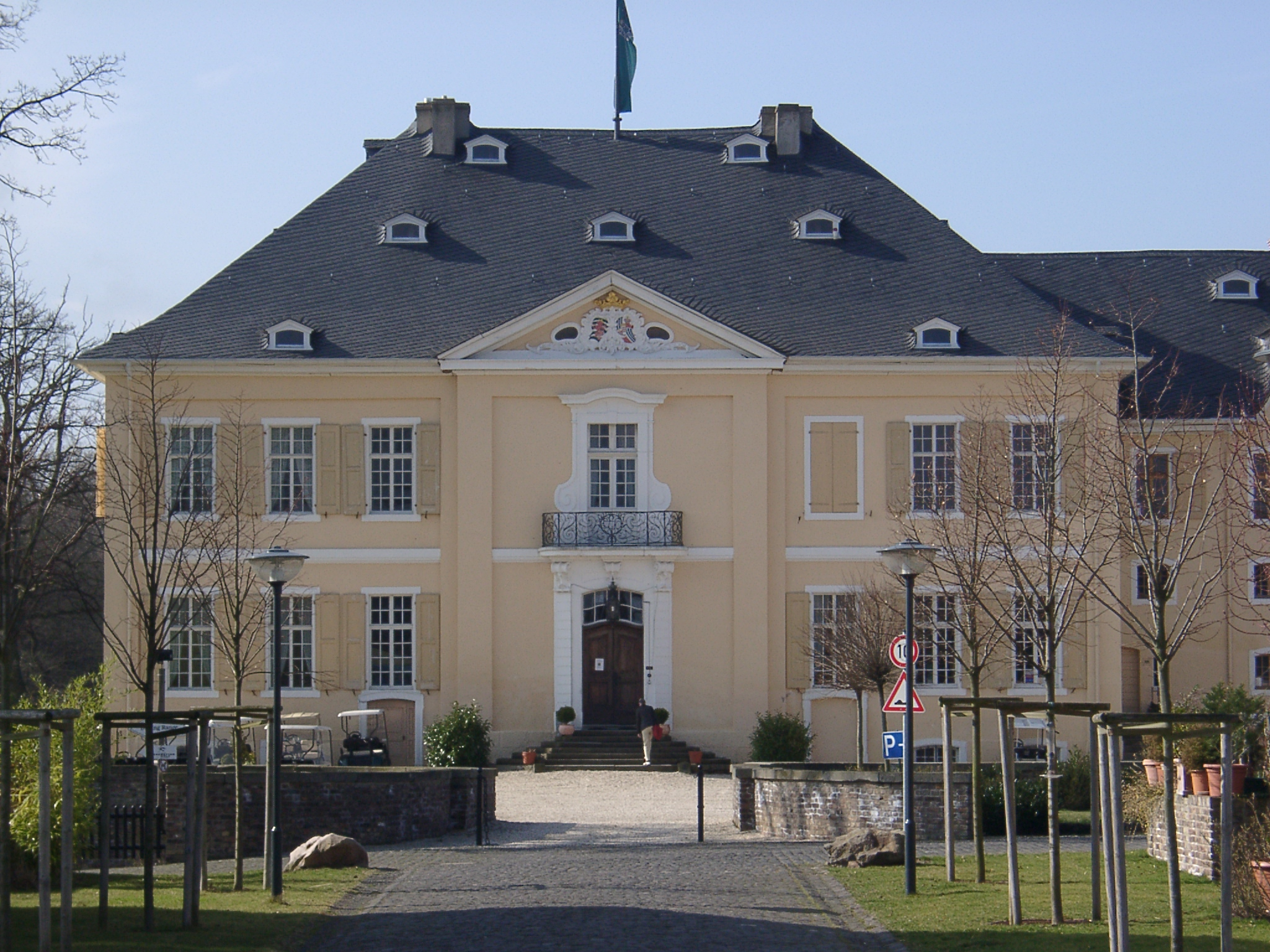 Schloss Miel